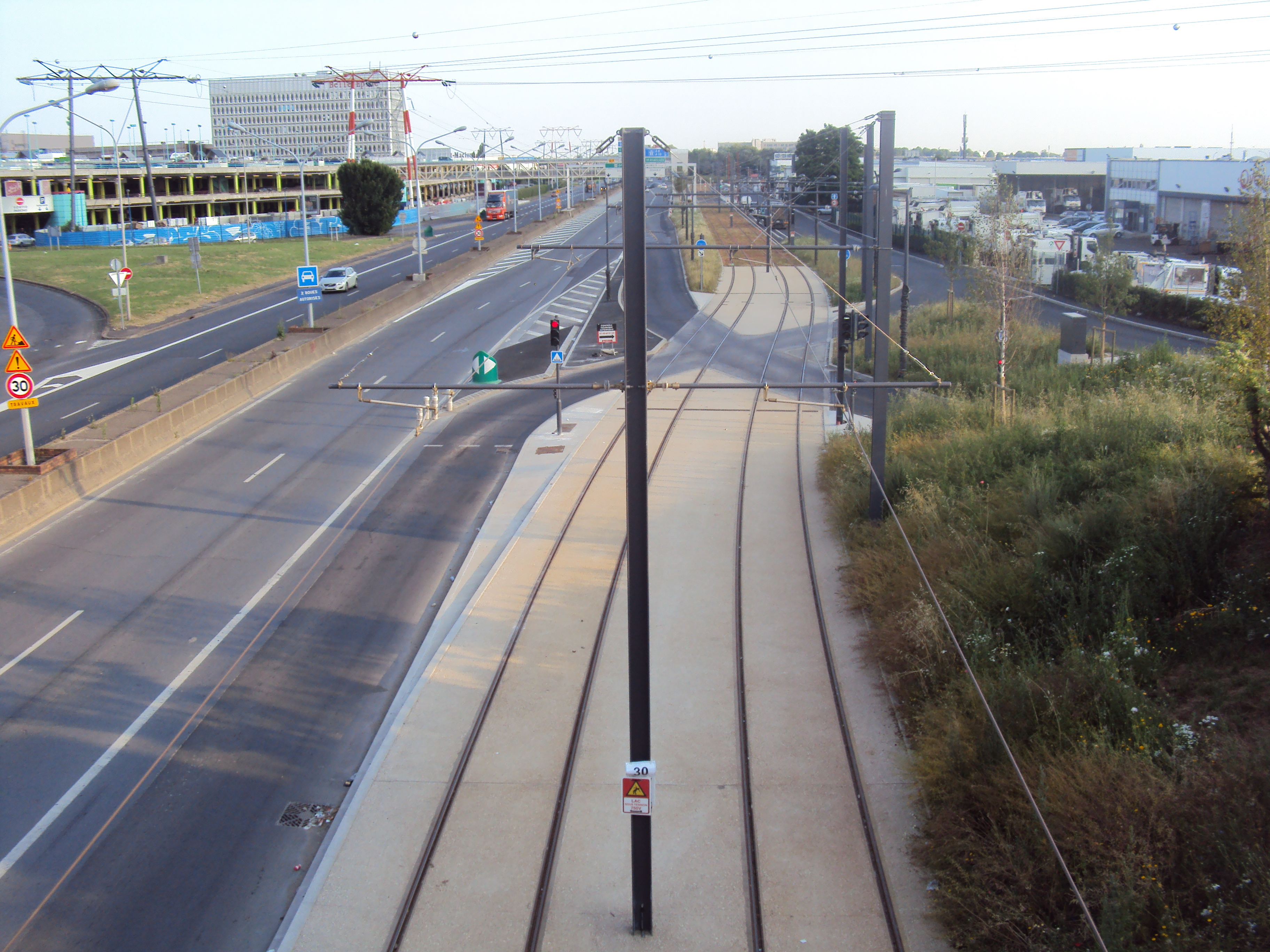 Travaux du T7 au voisinage de Belle épine